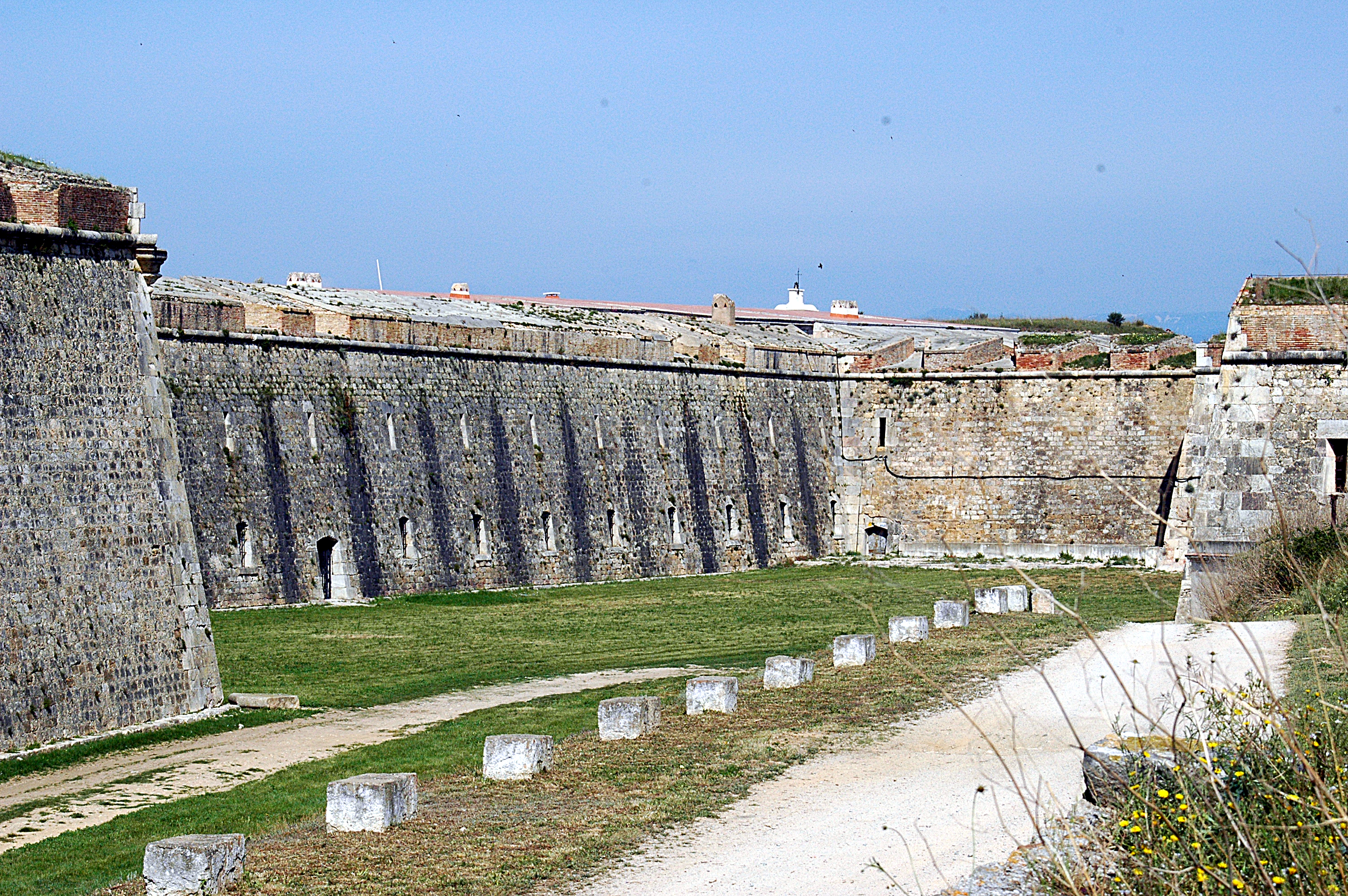 Castell de Sant Ferran (Figueres)